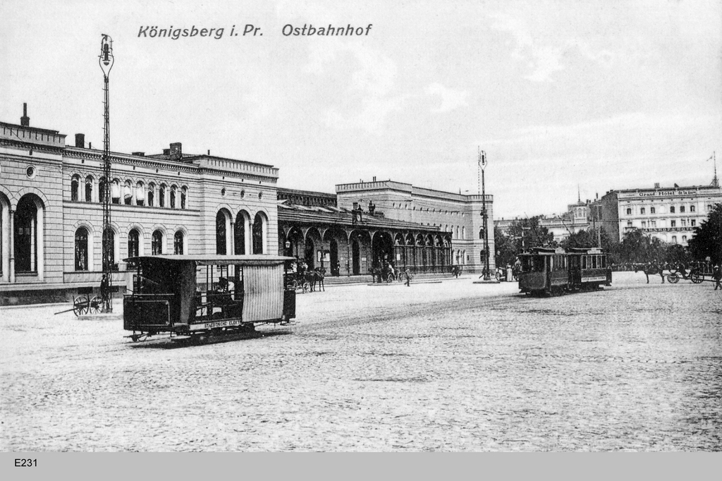 Königsberg